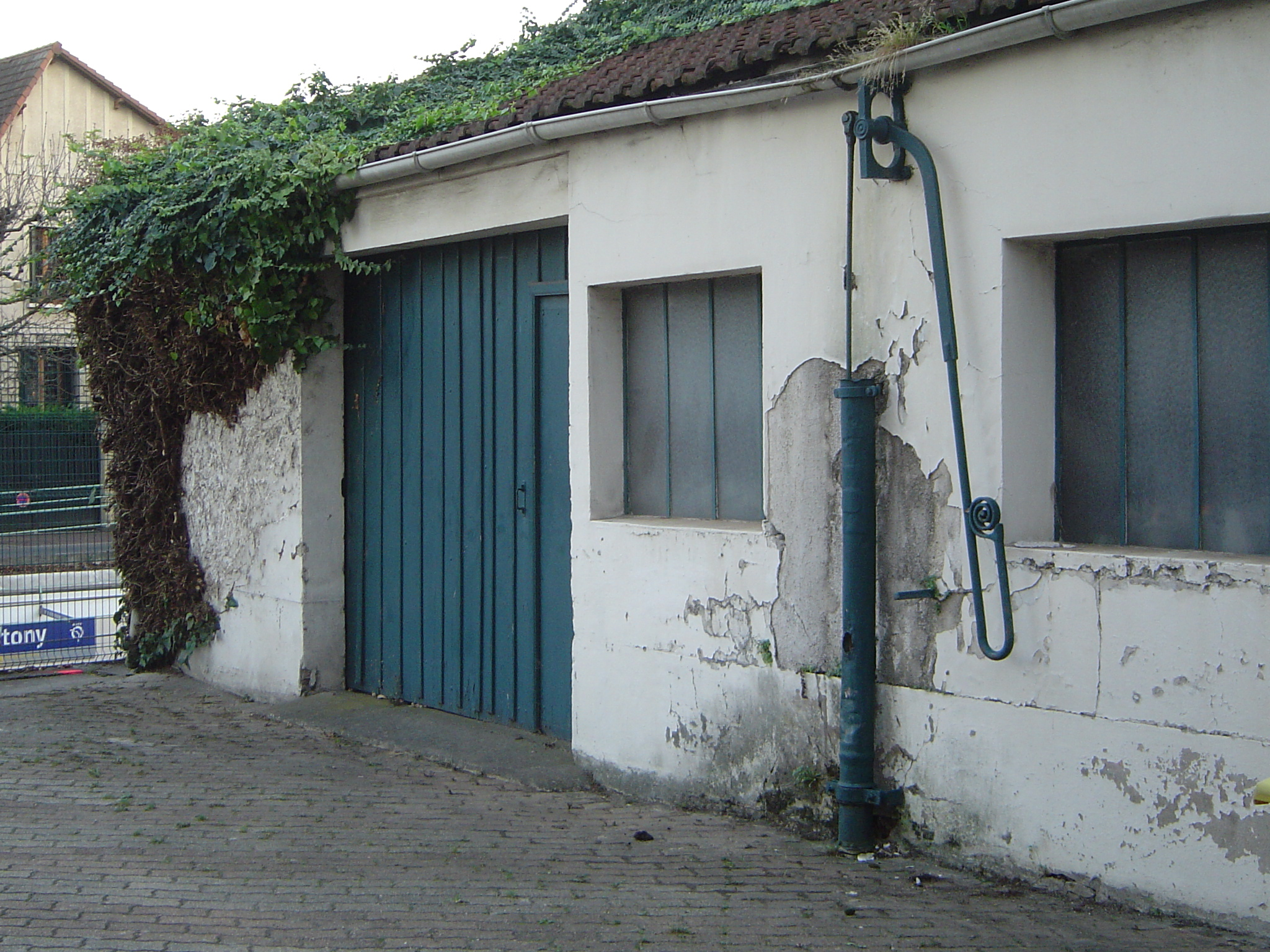 Photo prise à Antony (France)